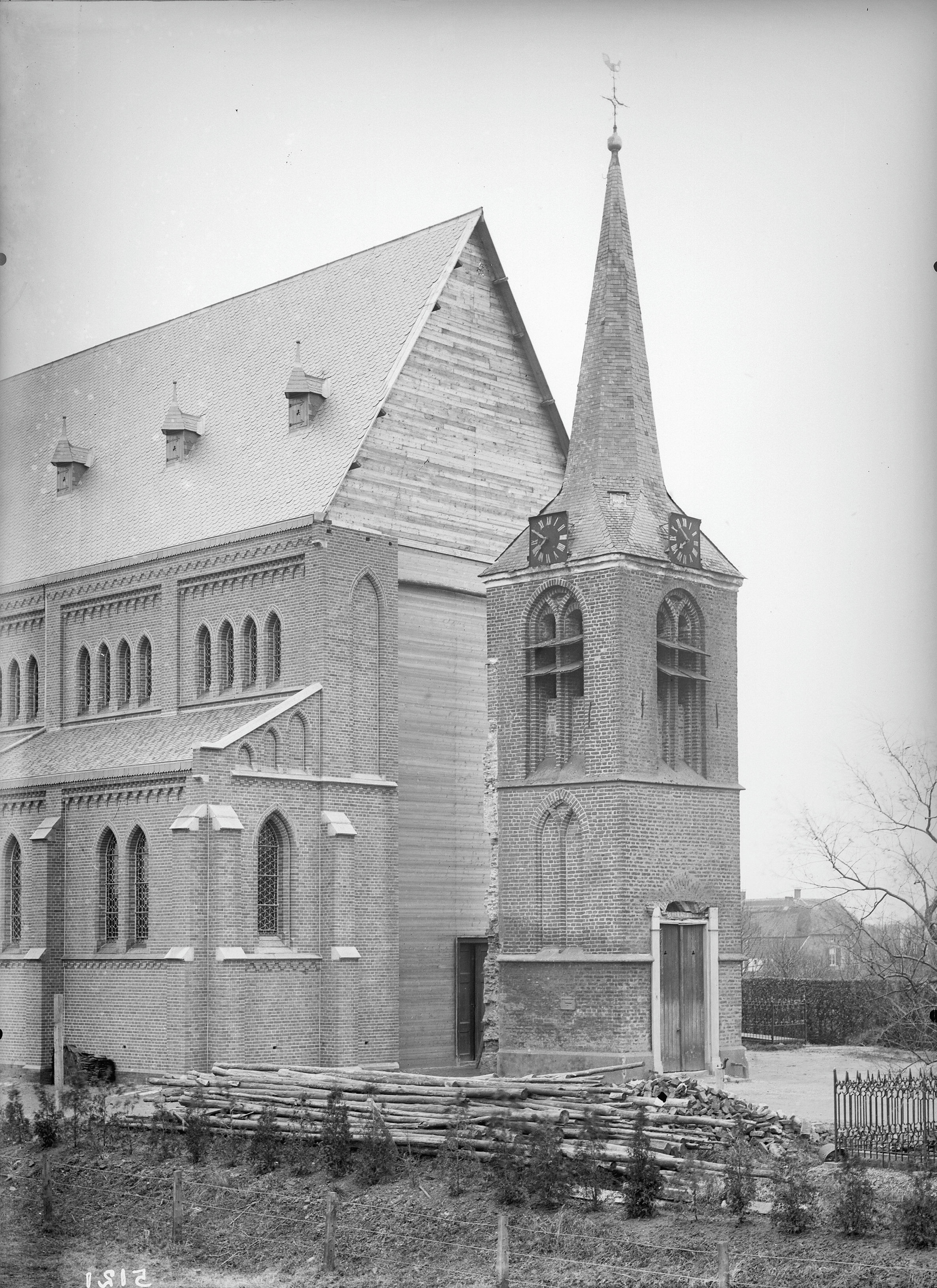 Gemeentetoren: noord-west aanzicht (opmerking: Fotonummer 6199)